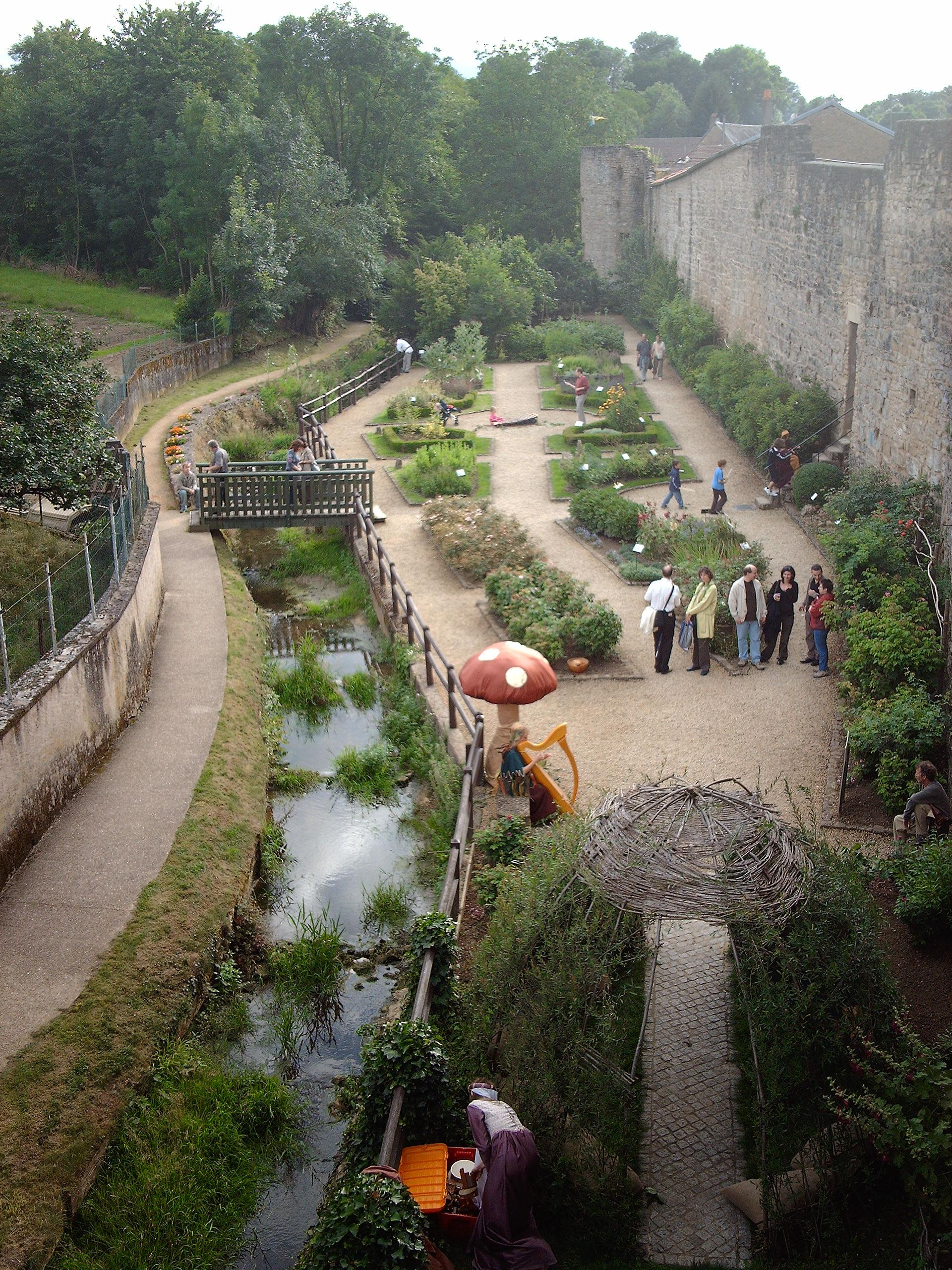 JardinMedievalRodemack.jpg